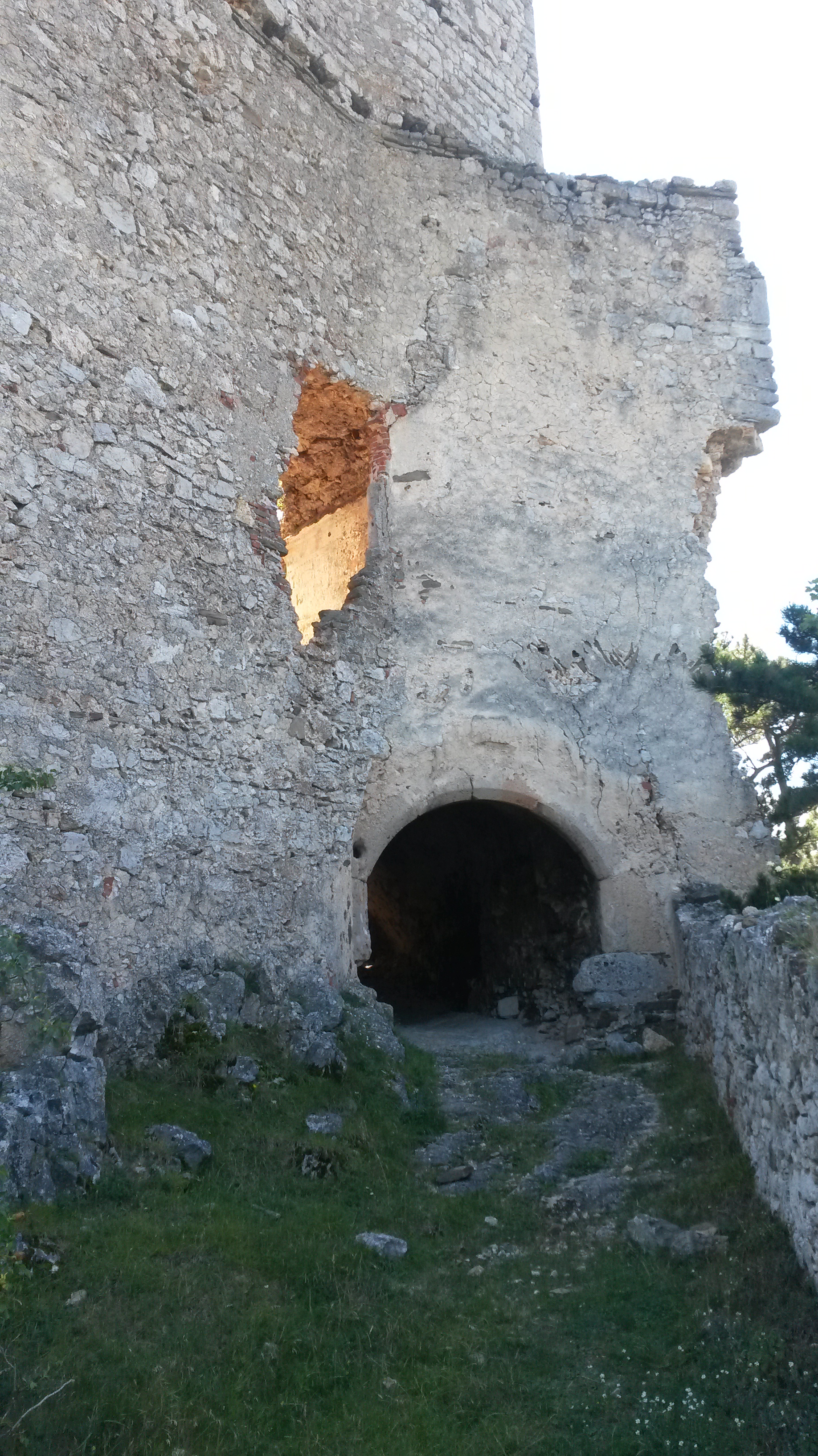 Burgruine Emmerberg (NÖ), Tor II, Blick aus Ost.